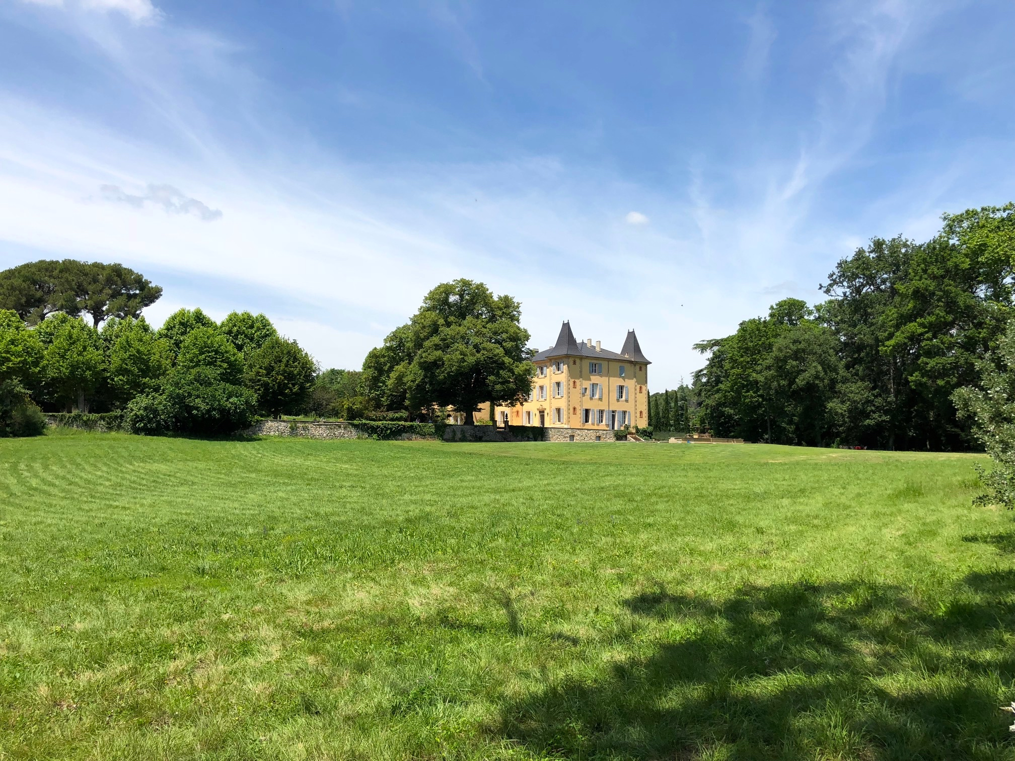 Le château vue de la campagne